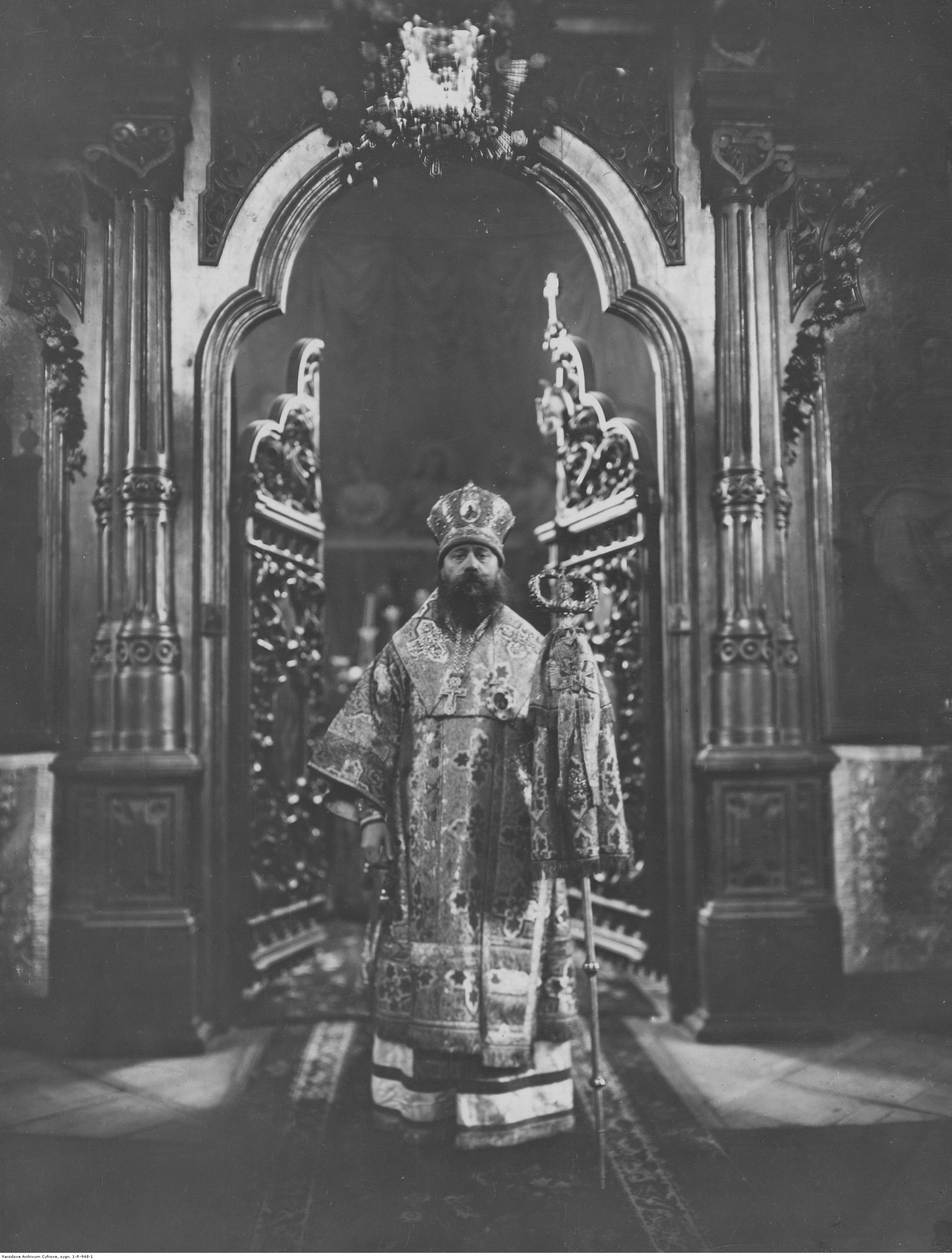 Metropolita Dionizy Waledyński w soborze świętej Marii Magdaleny w Warszawie